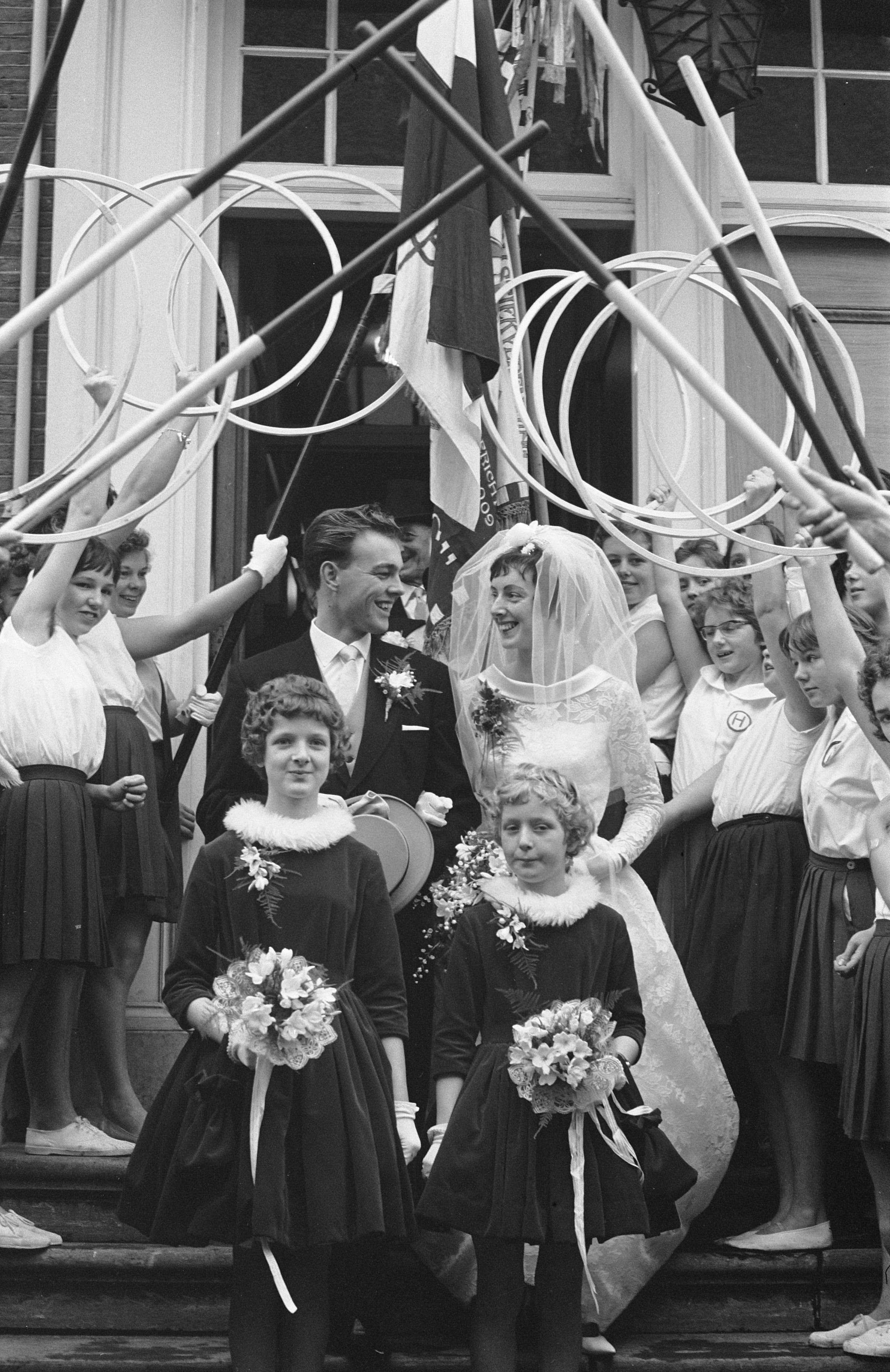 Collectie / Archief : Fotocollectie Anefo Reportage / Serie : [ onbekend ] Beschrijving : Huwelijk van turnster Ria van Velsen met Thijs Rietveld in Bodegraven. Echtpaar verlaat het stadhuis door een erehaag van turnsters Datum : 14 december 1961 Locatie : Bodegraven, Zuid-Holland Trefwoorden : echtparen, erehagen, huwelijken, sport, stadhuizen, turnsters Persoonsnaam : Rietveld Thijs, Velzen, Ria van Fotograaf : Rossem, Wim van / Anefo Auteursrechthebbende : Nationaal Archief Materiaalsoort : Negatief (zwart/wit) Nummer archiefinventaris : bekijk toegang 2.24.01.05 Bestanddeelnummer : 913-2888